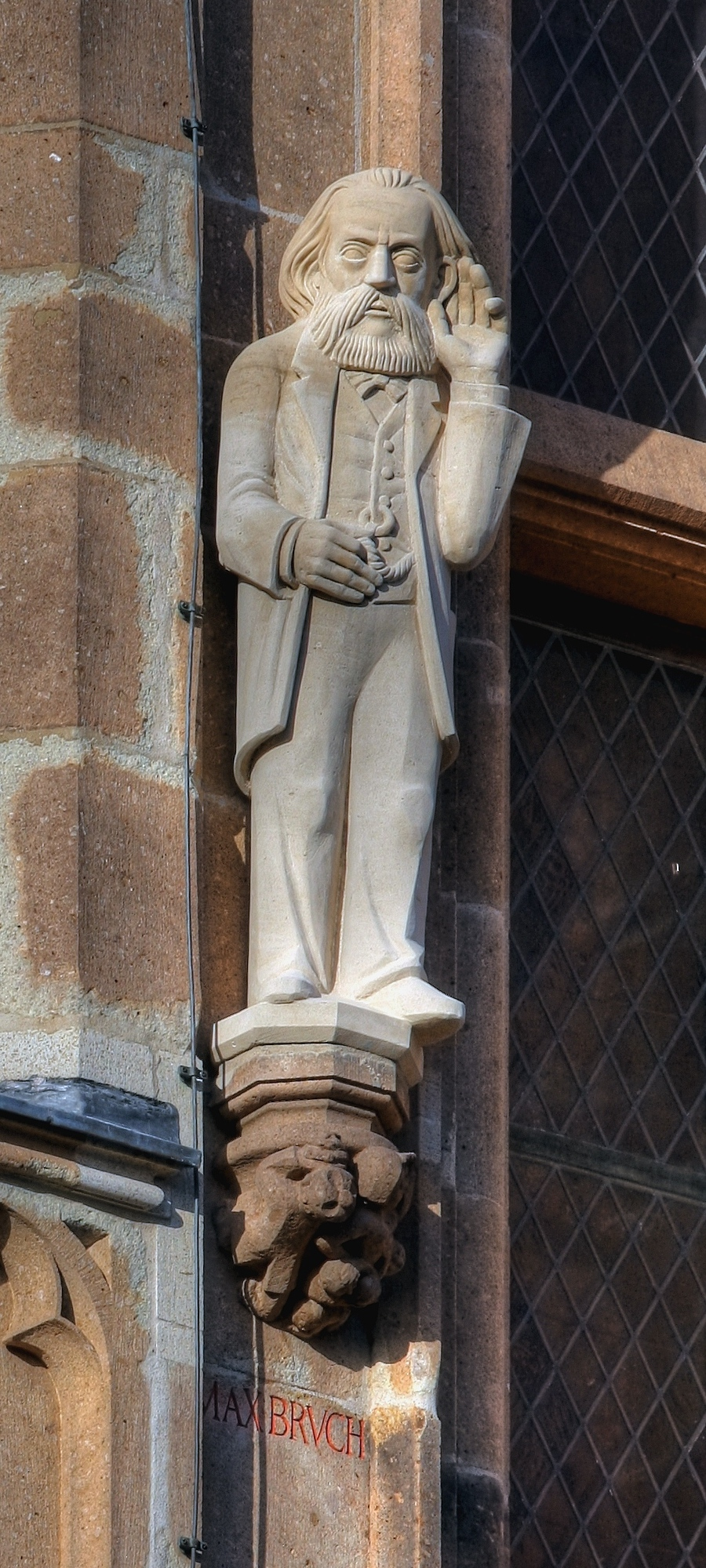 Figur des Max Bruch. Thema der Konsole unter der Statue des Max Bruch: „Antibabypille“. Bildhauer: Gerd Haas